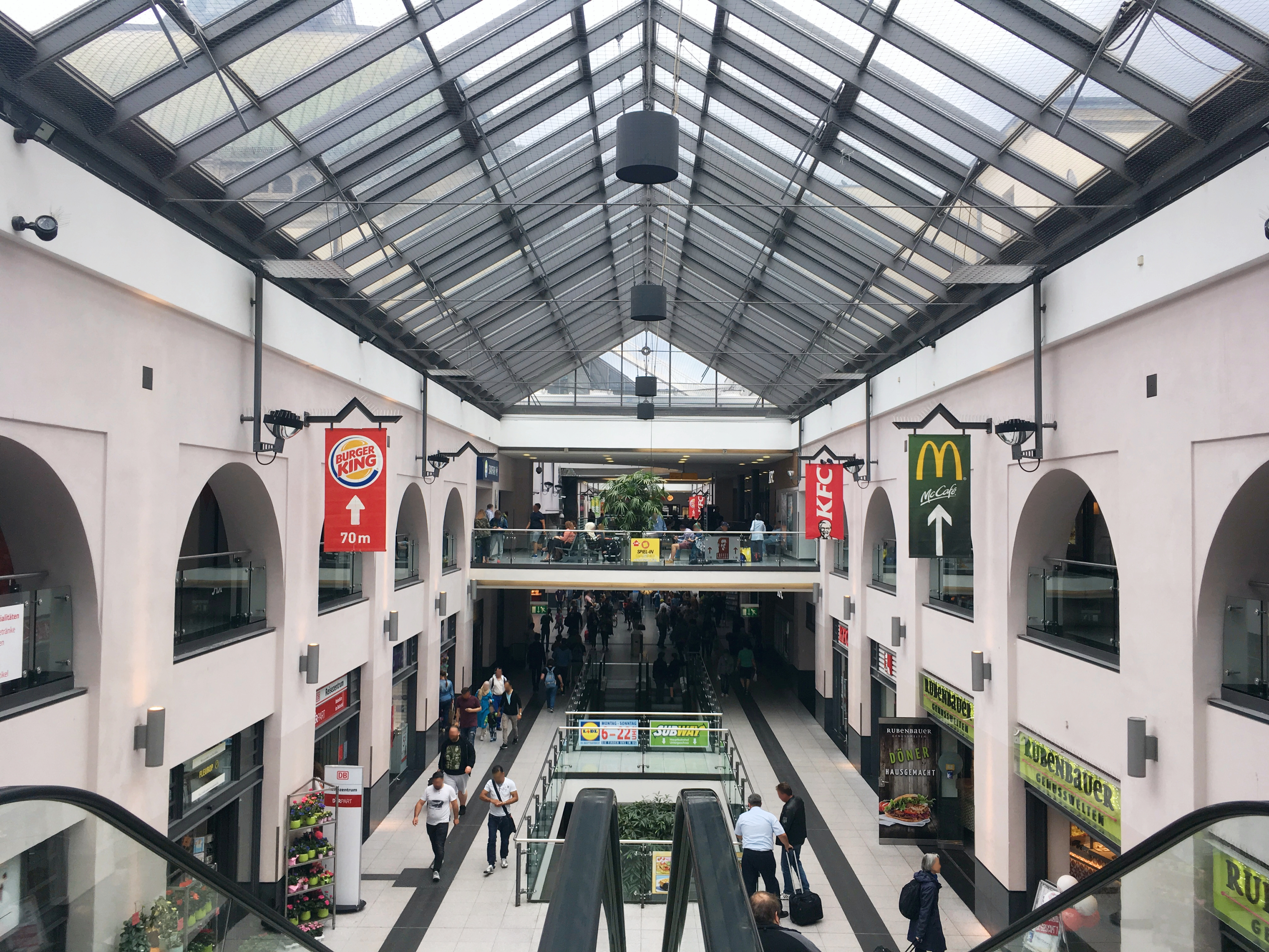 Westflügel des Nürnberger Hauptbahnhofs.